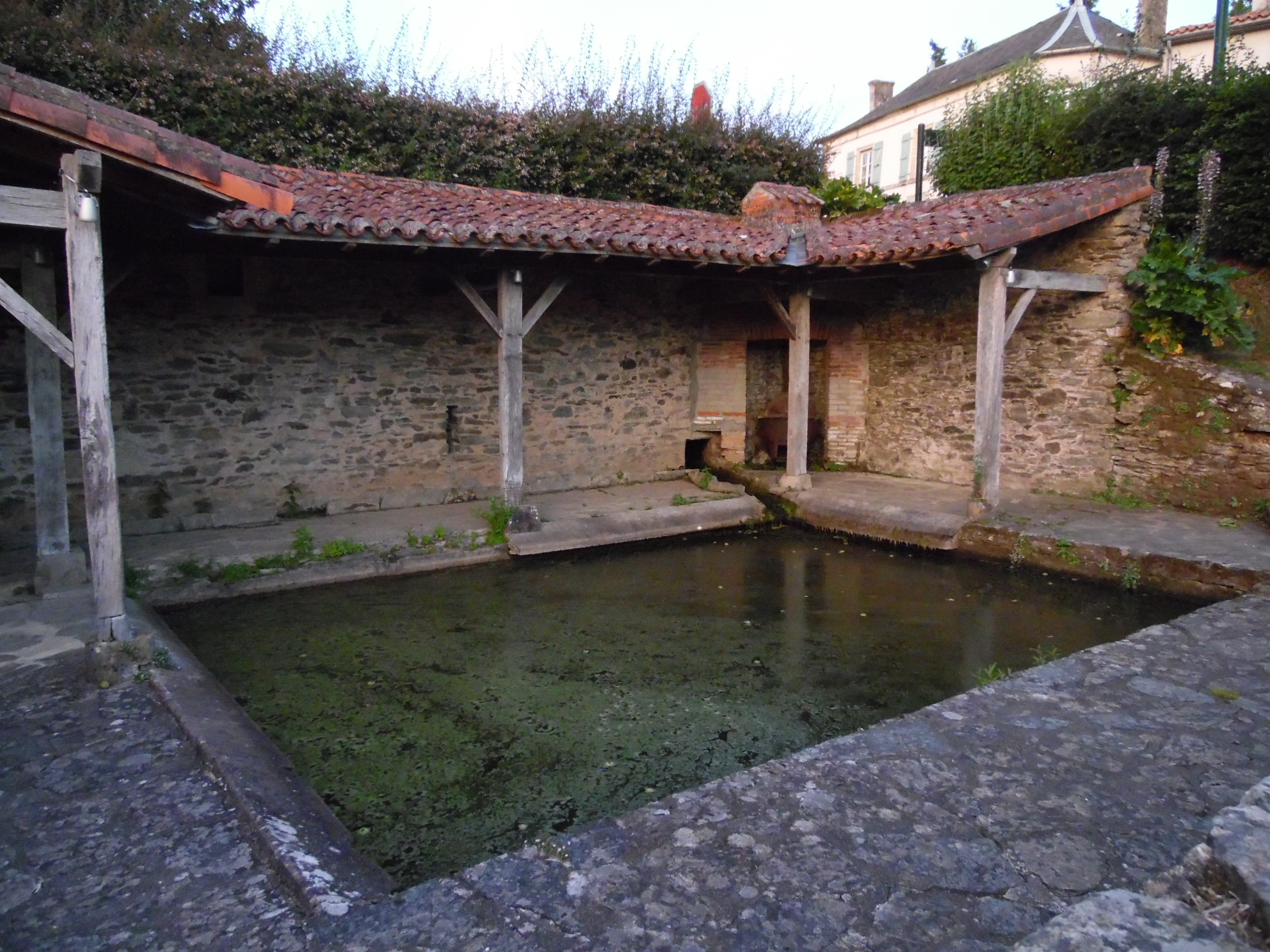 Le lavoir de Vouvant situé à l'entrée est de la cité médiévale.